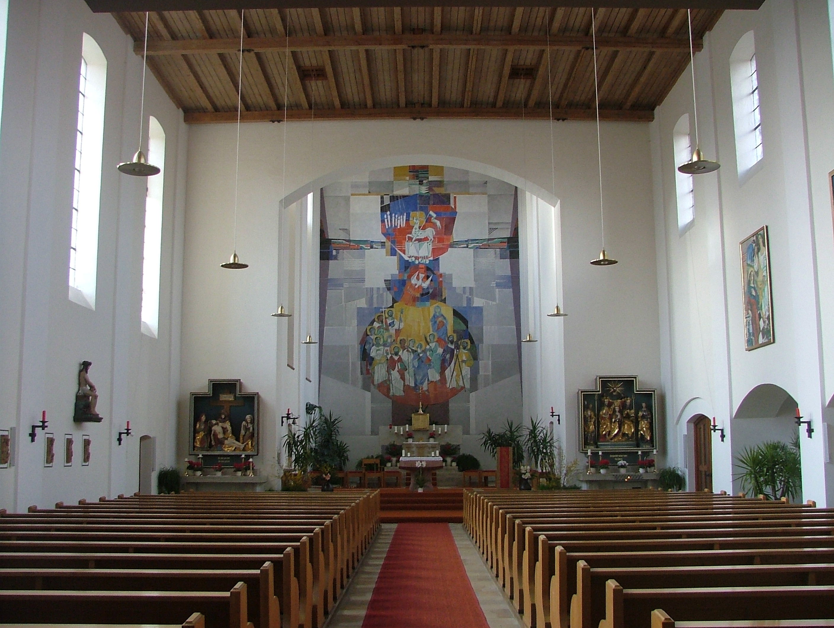 Hegge